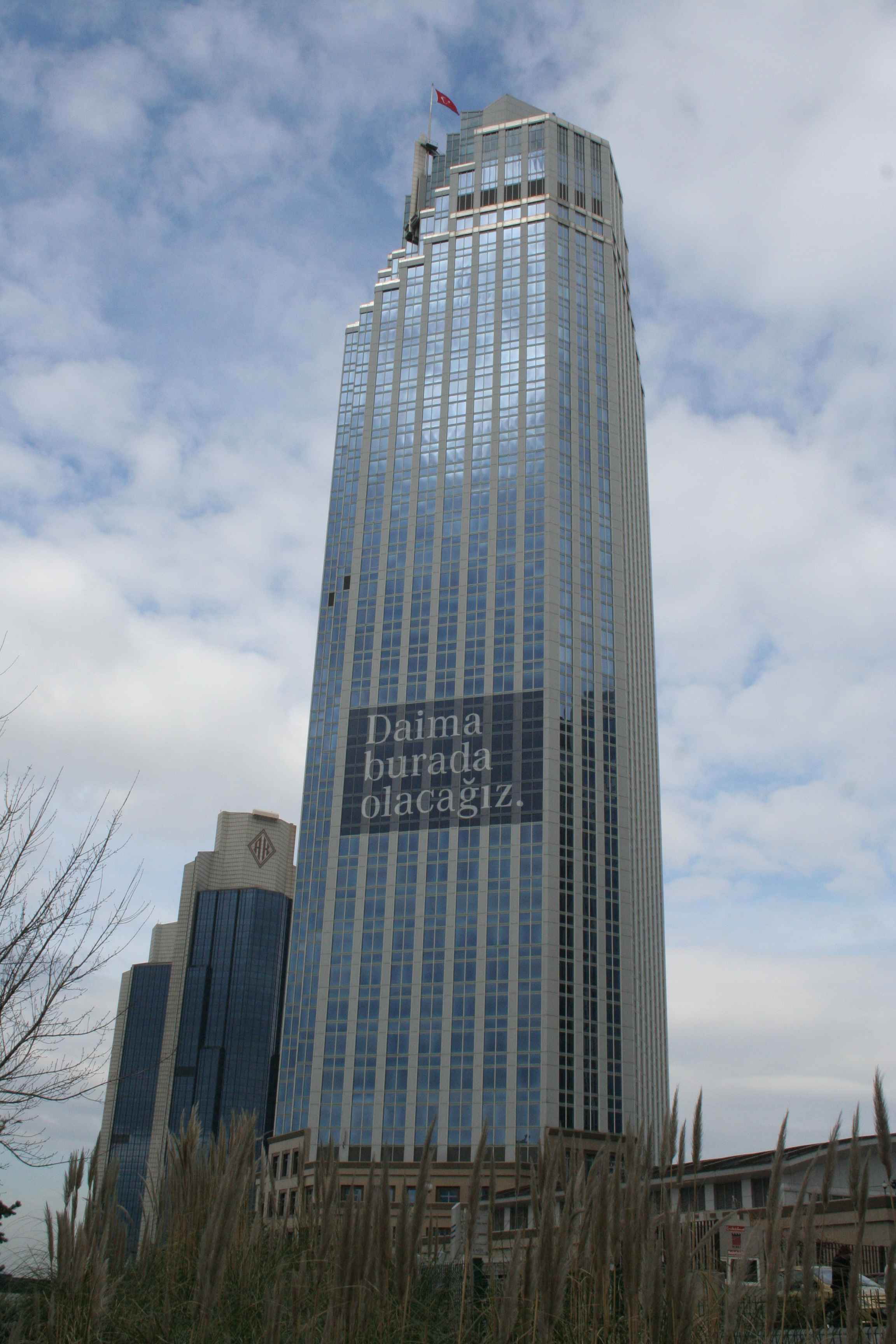 İş Kuleleri 1